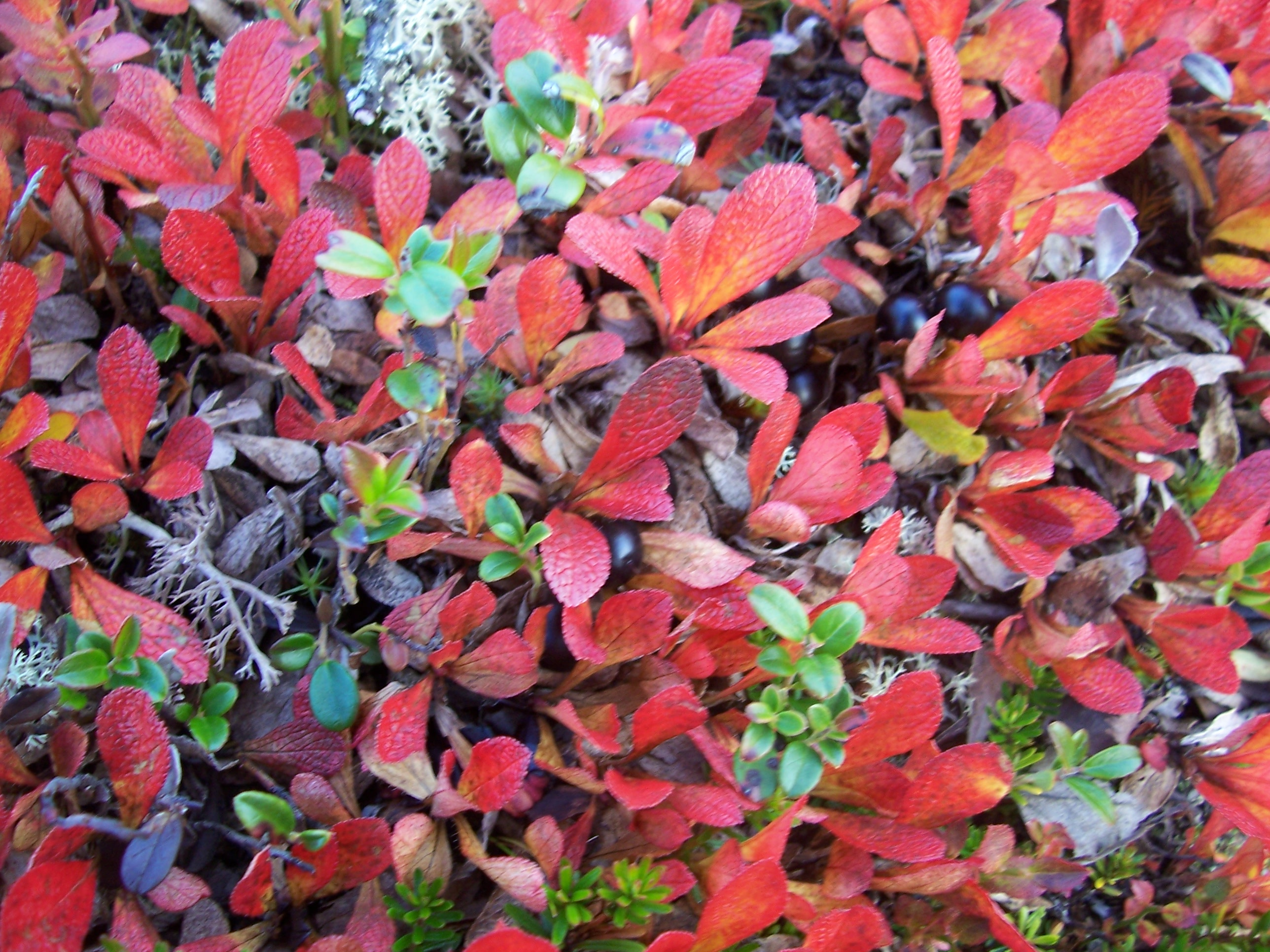 Riekonmarjaa ruska-aikaan